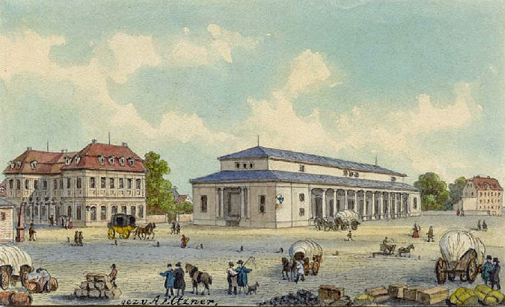 Königliches Hauptzollamt (links) und Waagegebäude (rechts) 1846 vor dem Hallischen Tor in Leipzig.